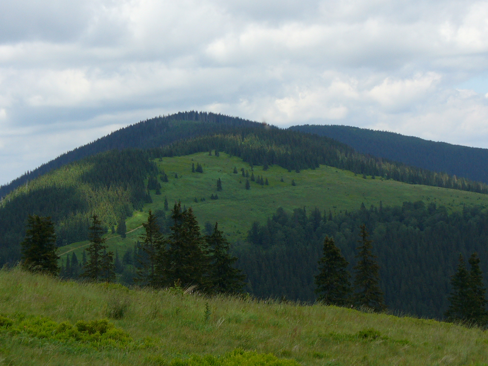 Romanka (po lewej)